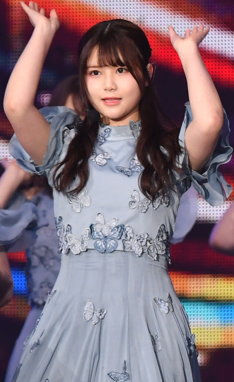 2019.01.26「第14回 KKBOX MUSIC AWARDS in Taiwan」乃木坂46 @台北小巨蛋